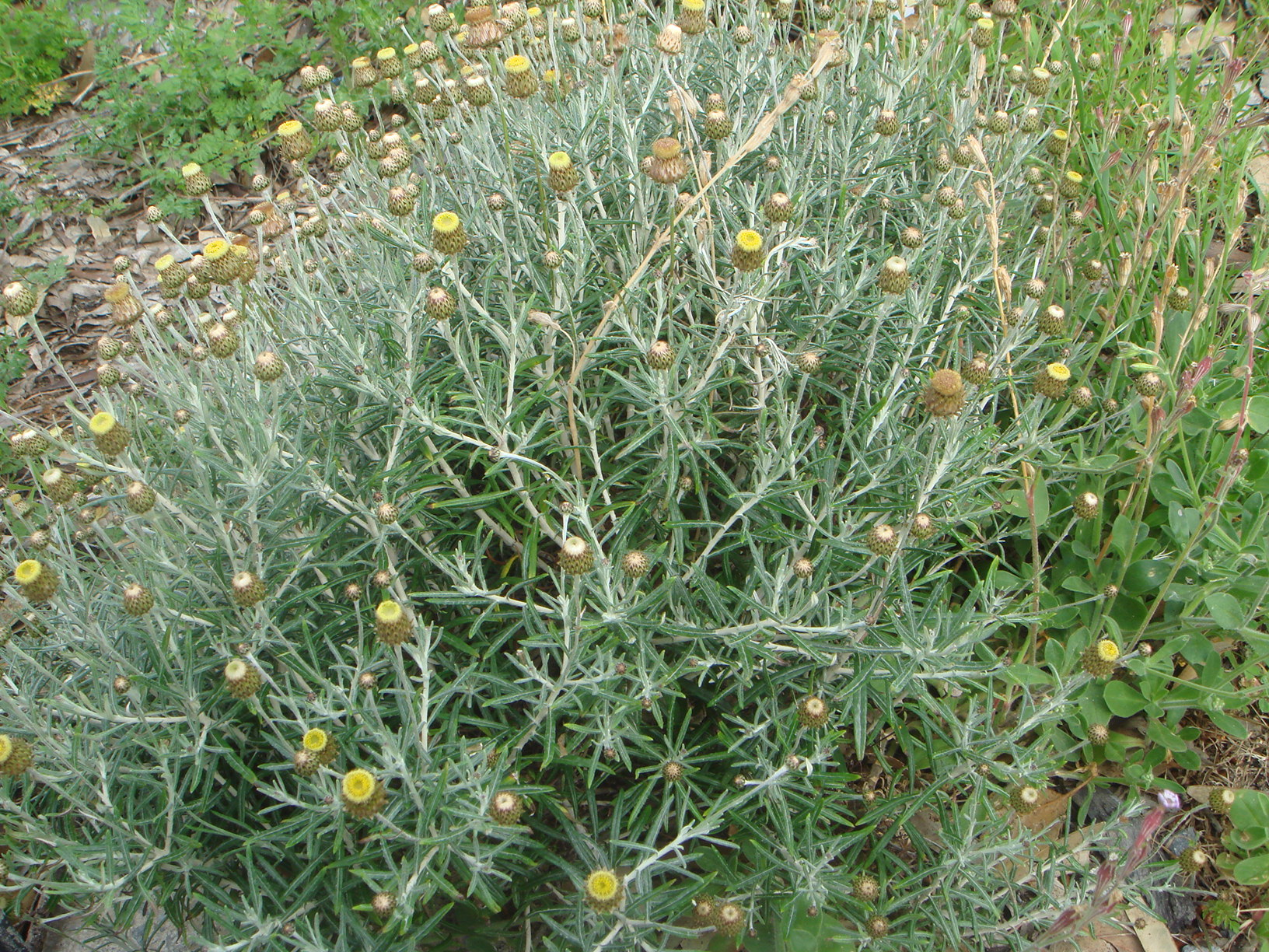 Phagnalon saxatile, Ceuta, España.